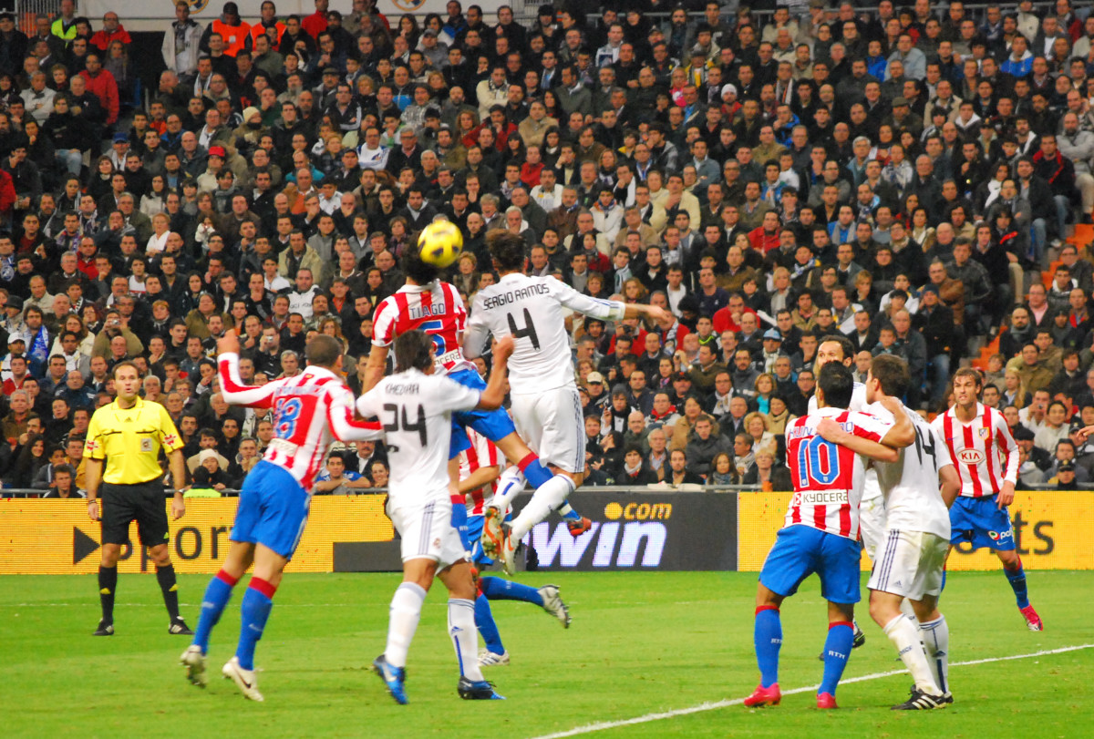 La Liga: Real Madrid 2 - Atletico 0 7 de Noviembre 2010